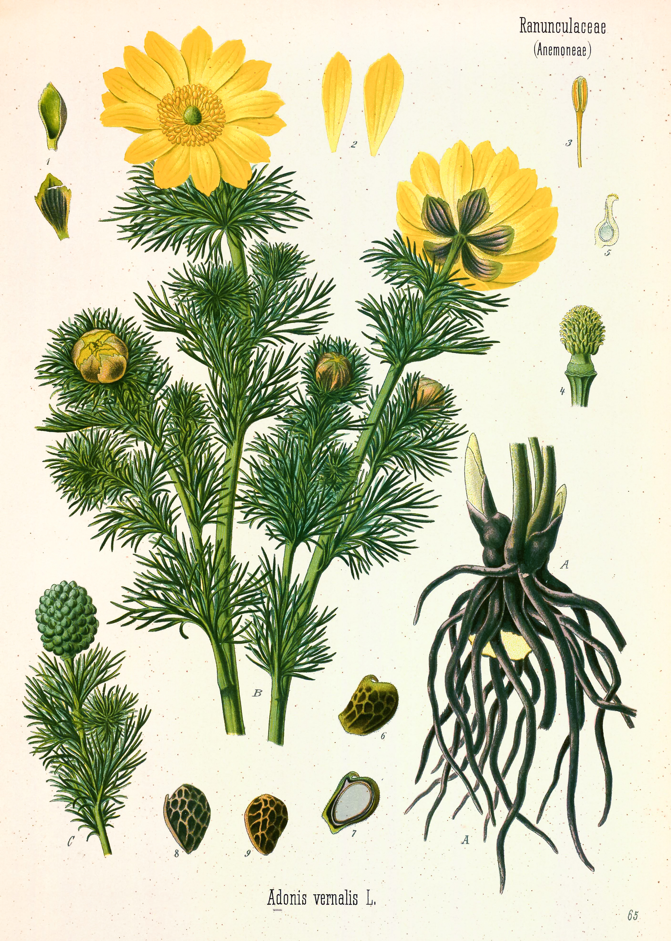 Frühlings-Adonisröschen. A Wurzel. B Blühende Pflanze. C Fruchtstand. 1 Kelchblätter; 2 Blumenblätter; 3 Staubblatt; 4 Pistille; 5 ein Pistill im Längsschnitt; 6 reife Beere; 7 dieselbe im Längsschnitt; 8 Endokarp; 9 Samen. — 3, 5, 6, 7, 8, 9 sind gegenüber den anderen Bildteilen vergrössert dargestellt.